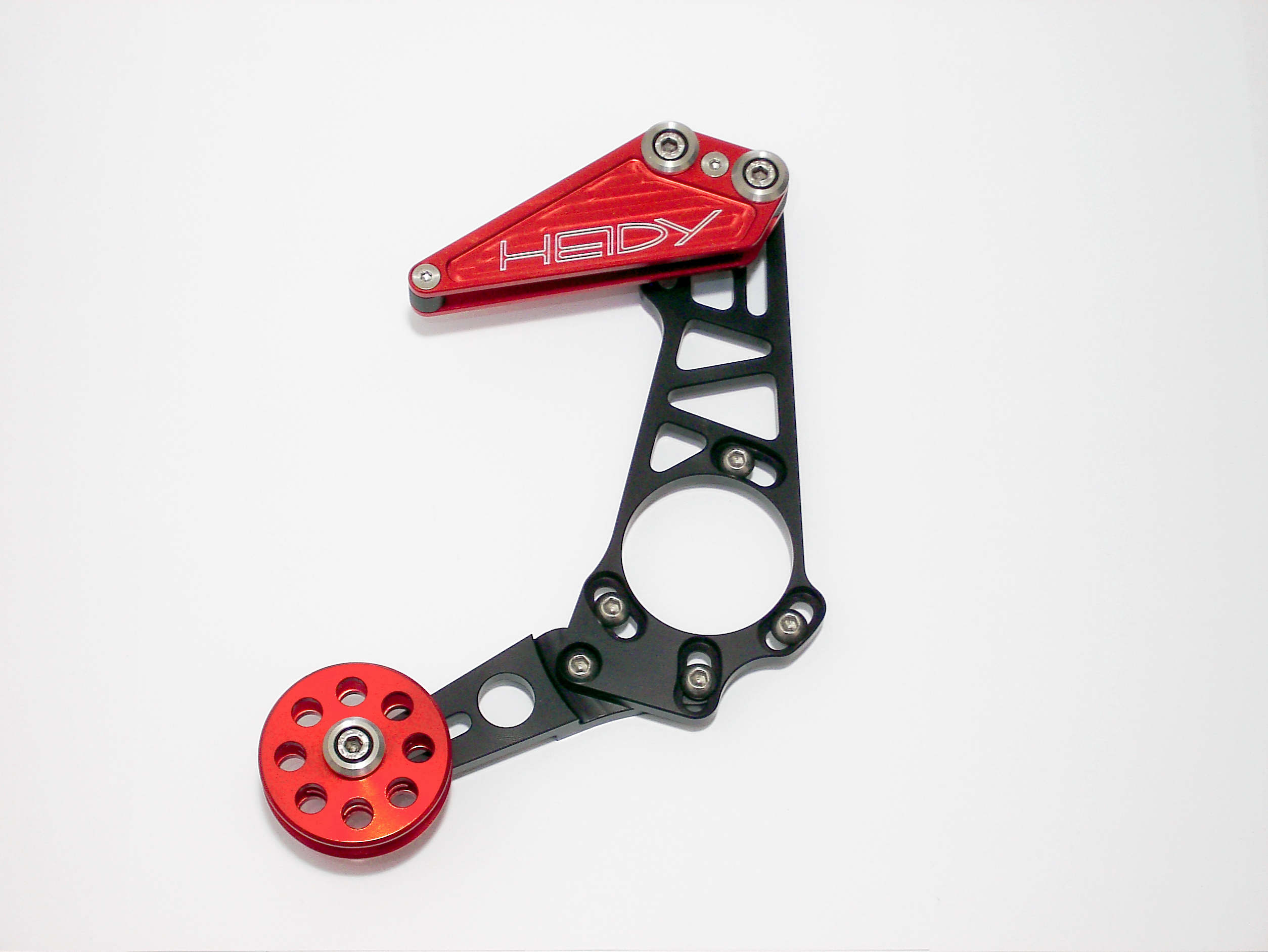 Kettenführung